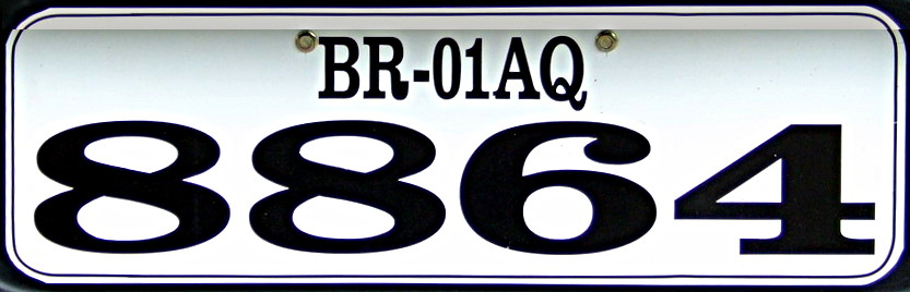 Targa dello stato indiano del Bihar